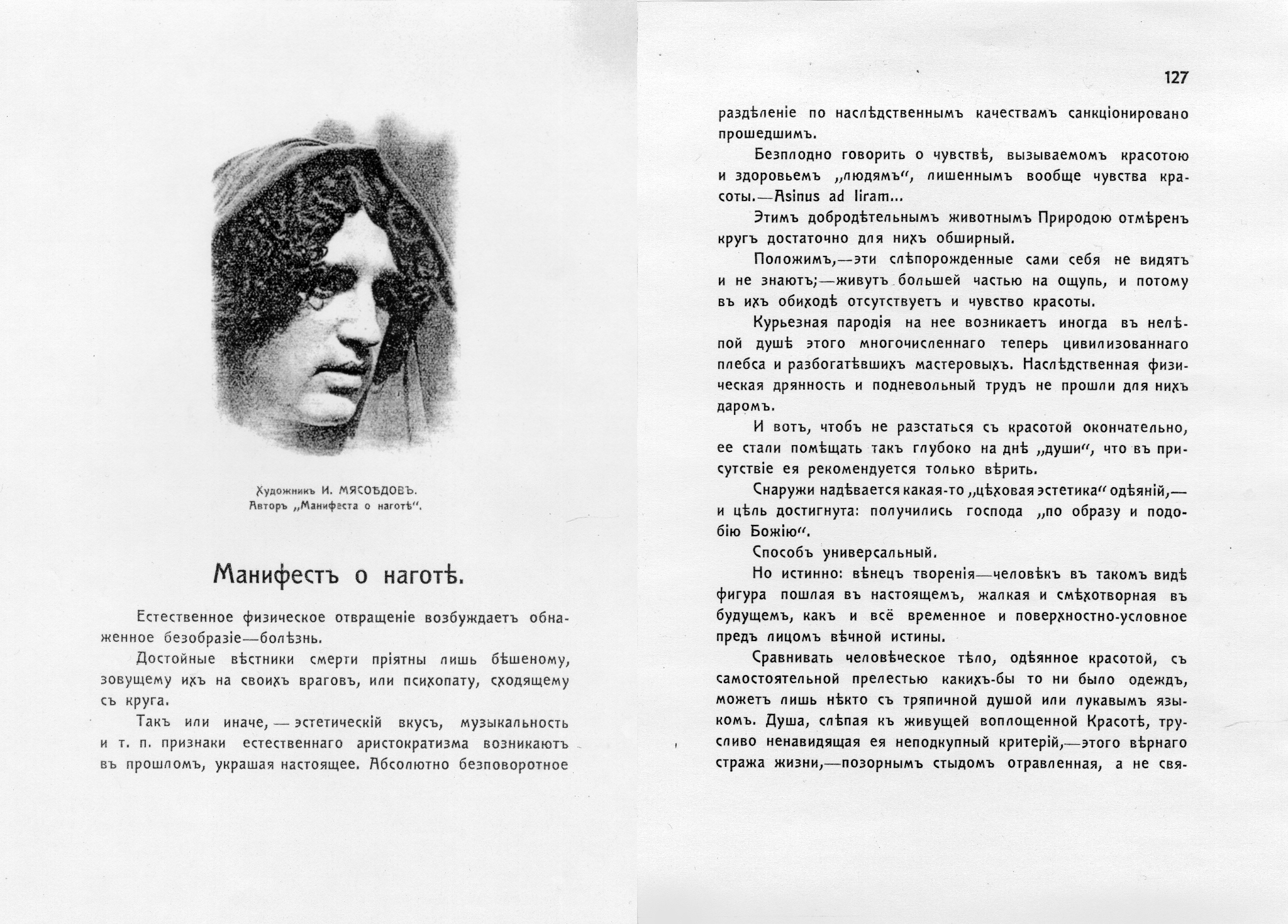 Копии страниц 126, 127 из книги "Нагота на сцене". Издательство Н. И. Бутковской. Санкт-Петербург. 1911